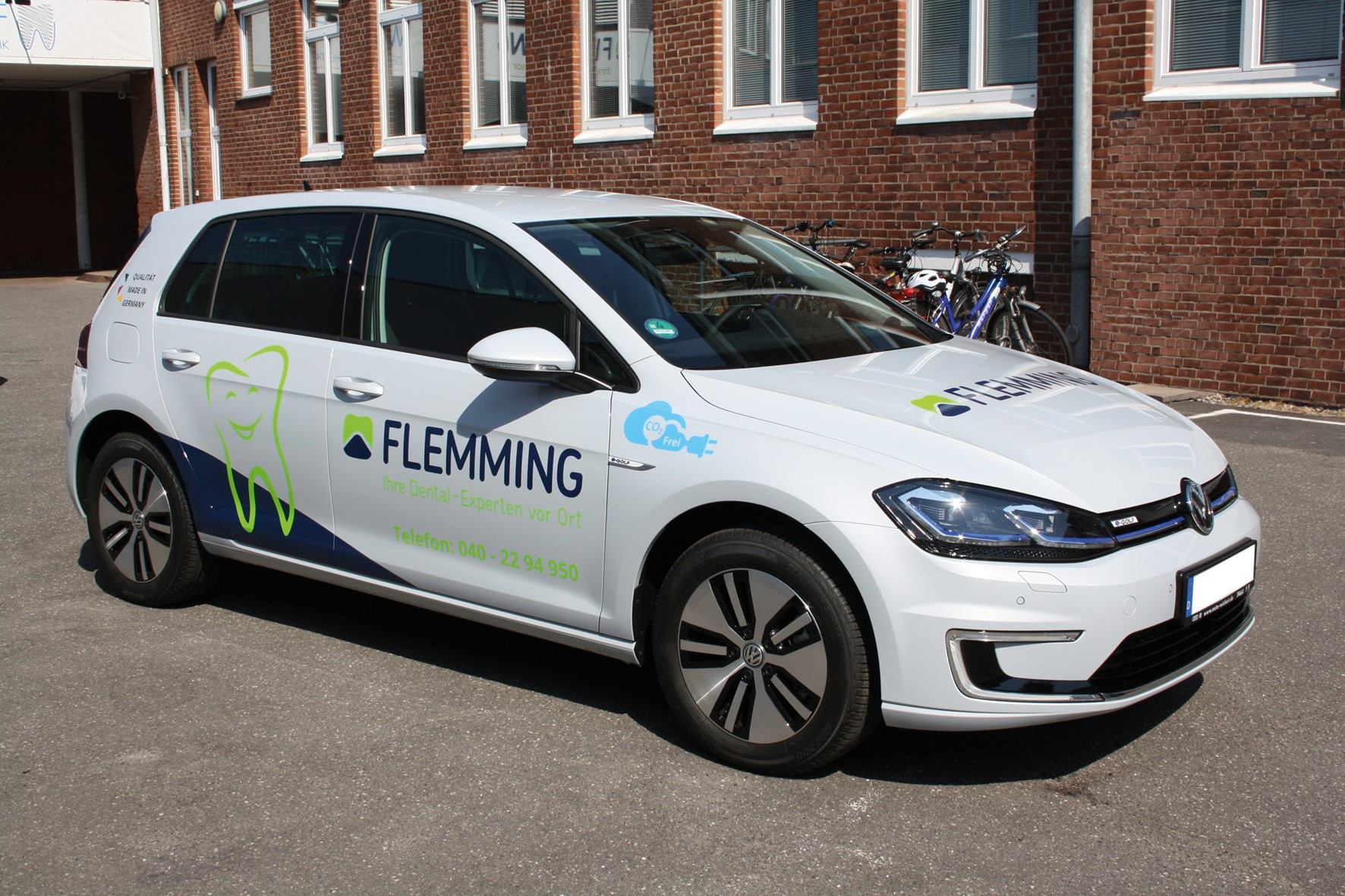 Botenfahrzeug (e-Golf) von Flemming Dental in Hamburg-Barmbek-Süd